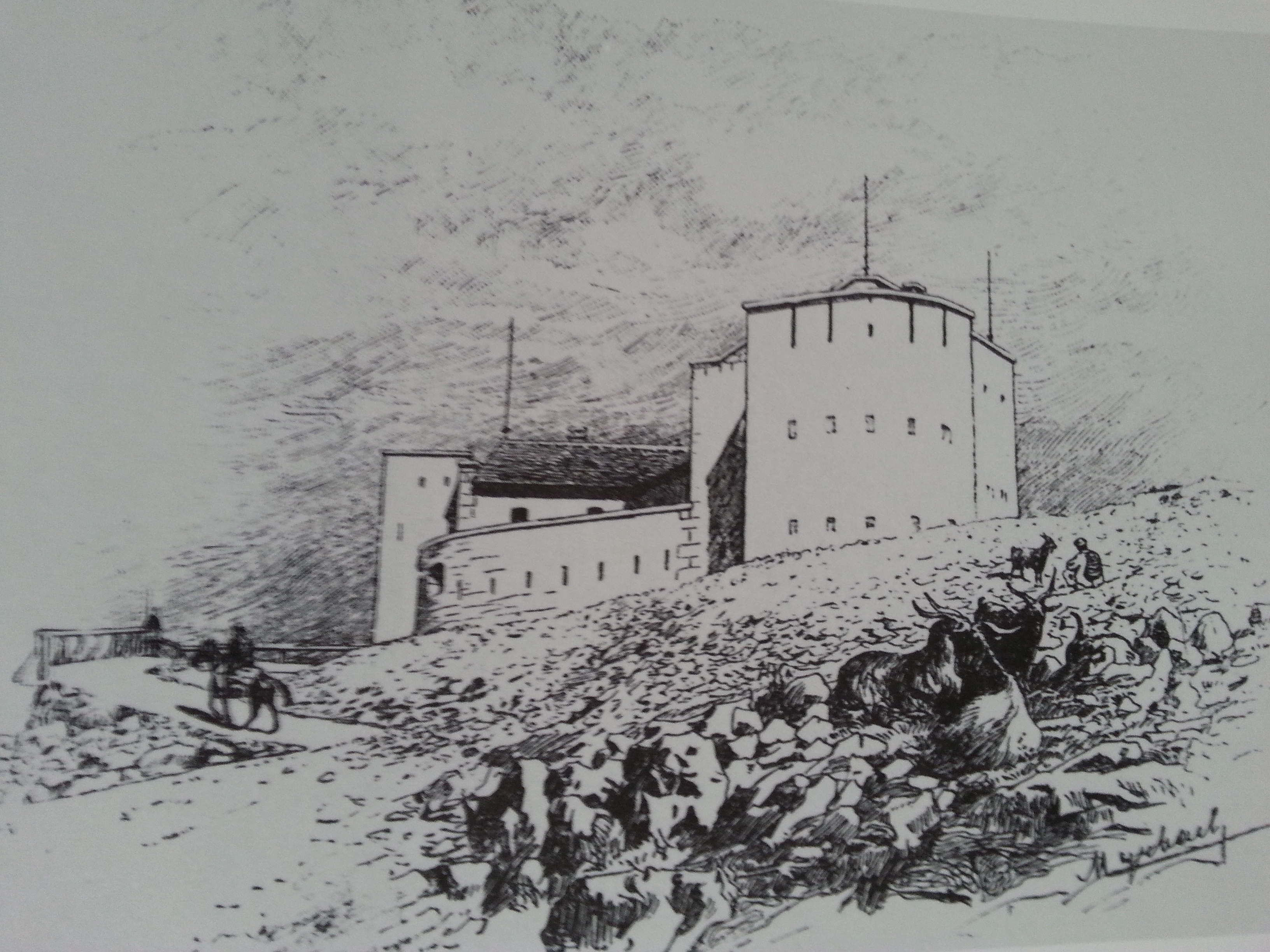 Das Werk Klicanje bei Trebinje, Bosnien-Herzegowina, Fort/Feldwache der k.k. Armee an der Grenze zu Montenegro.